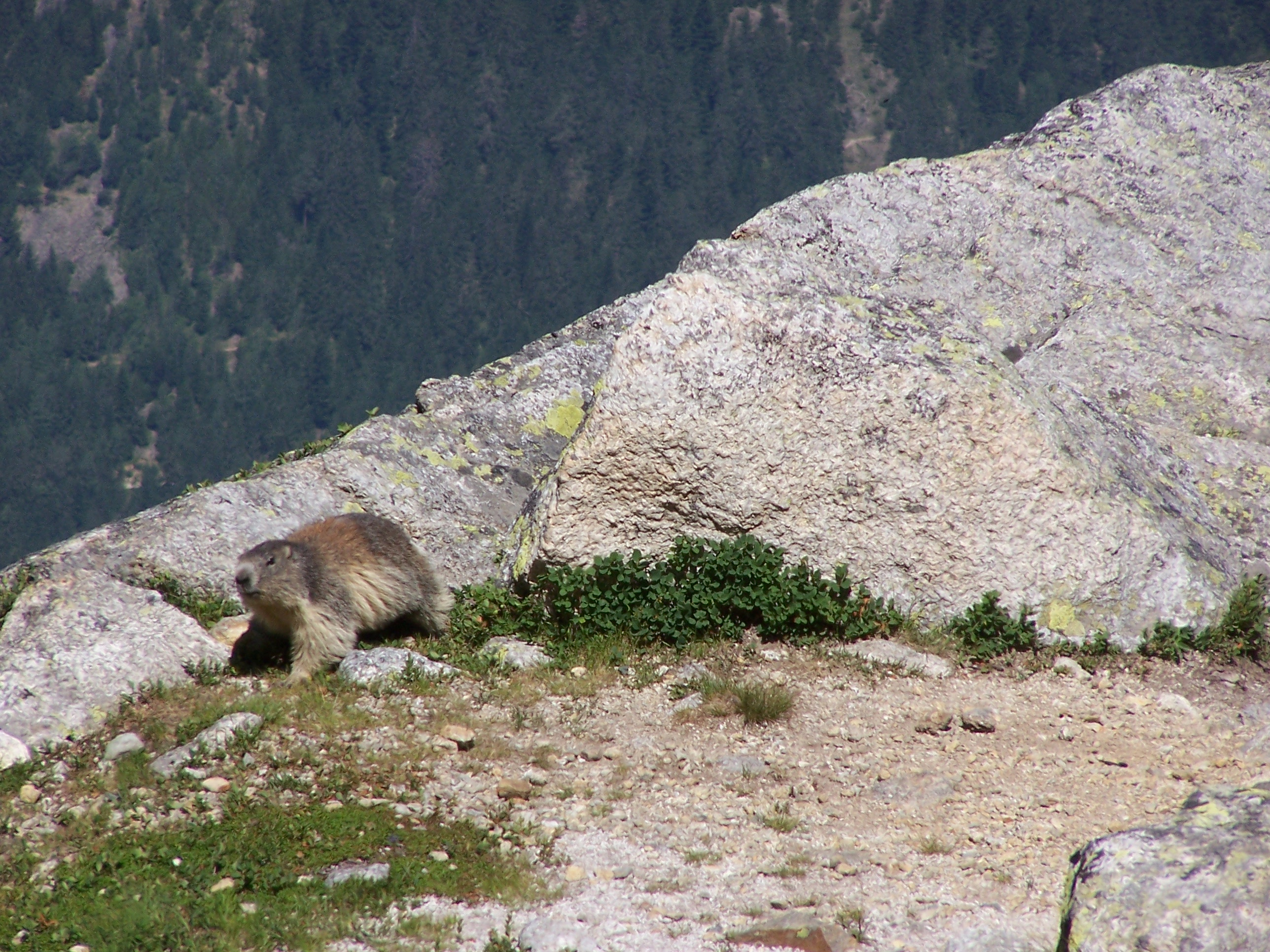 Marmotte sur le balcon de nord de Chamonix